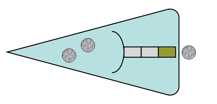 Les Fouaillages